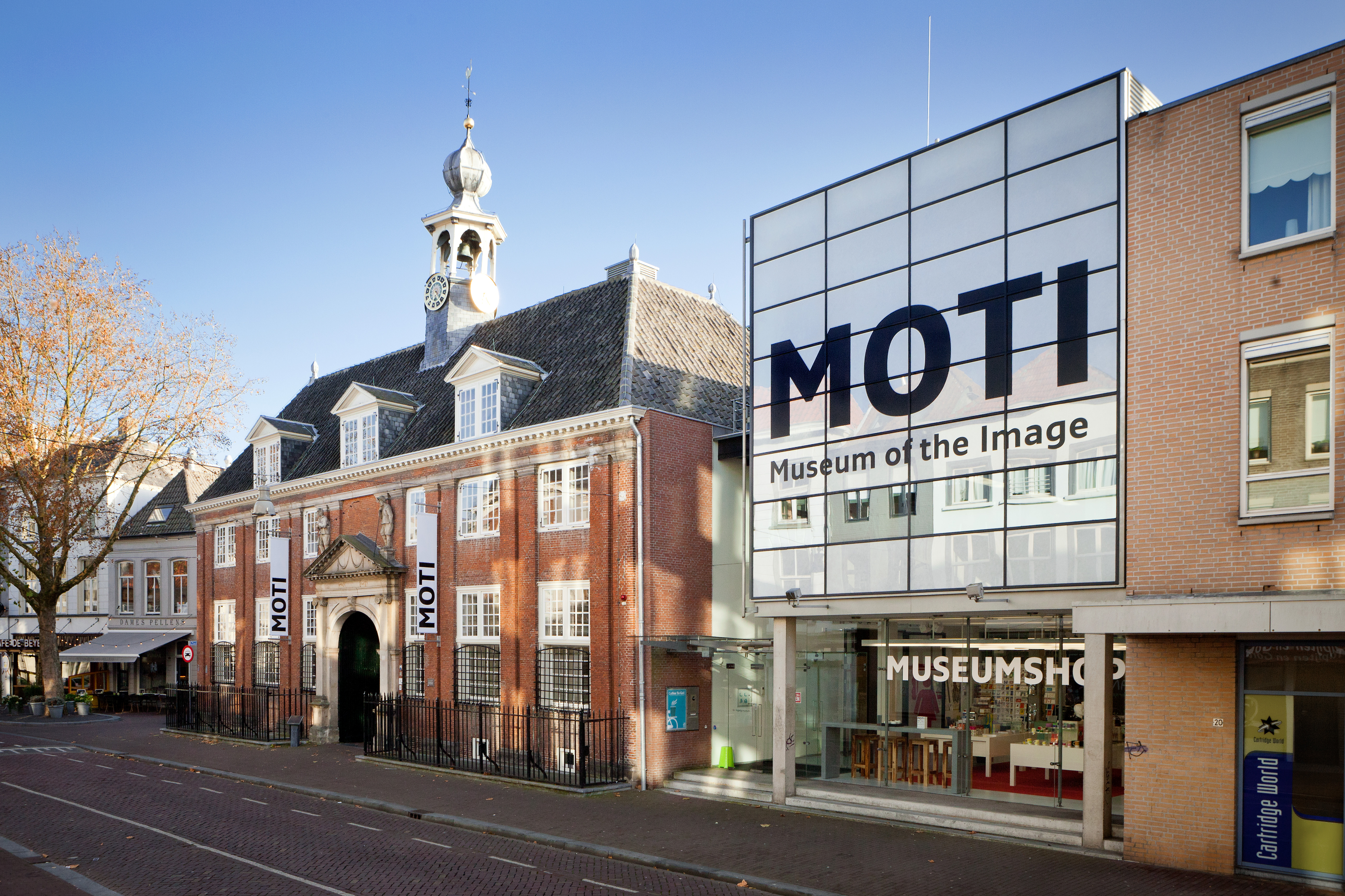 Zicht op een deel van het voormalige museum MOTI, Museum of the Image, gevestigd in de Boschstraat 22 in het centrum van Breda